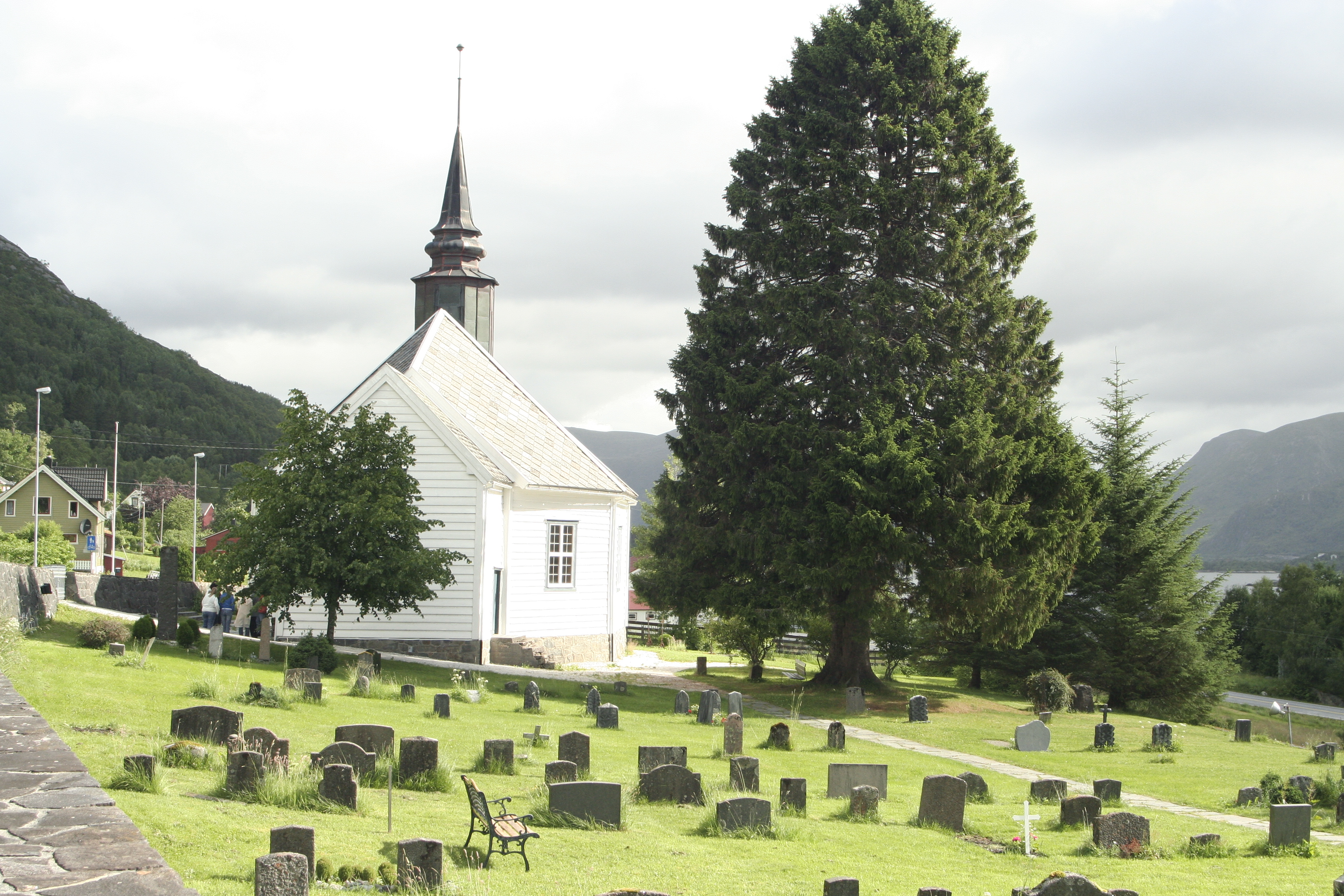 Leikanger church, Herøy, Norway